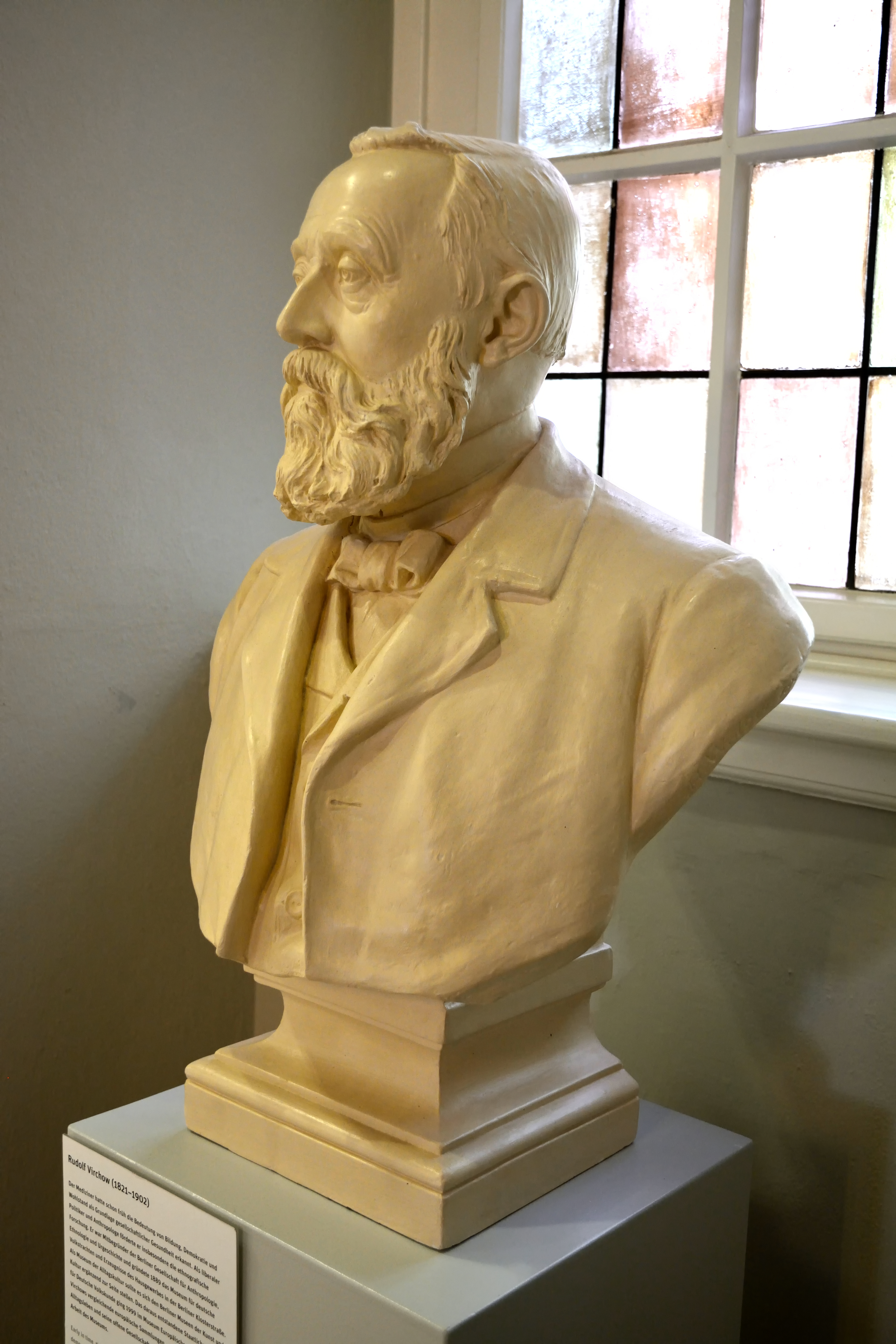 Impressionen aus dem Museum Europäischer Kulturen in BerlinHier: Skulptur von Rudolf Virchow im Eingangsbereich des Museums